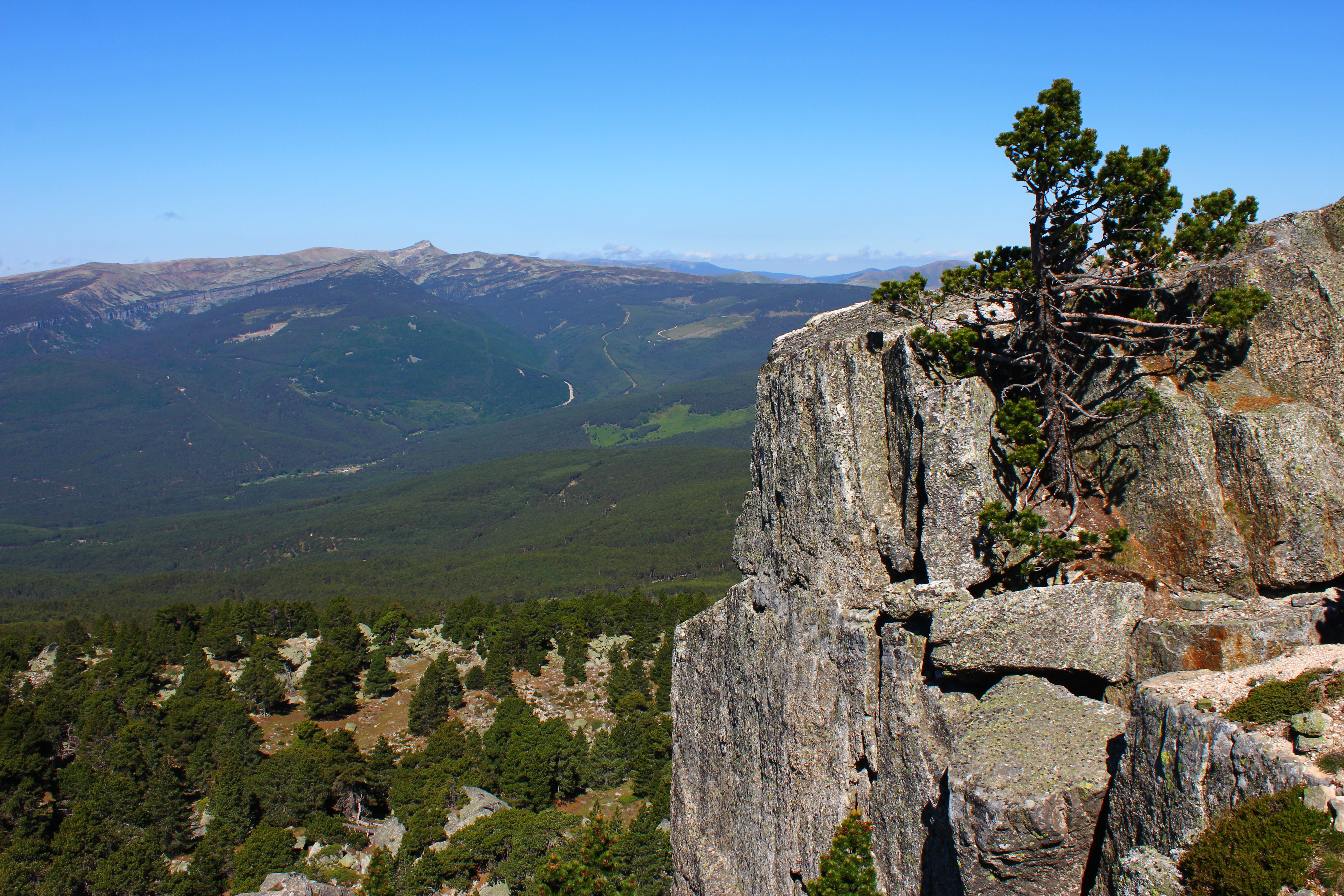 Sierras de Urbión y Cebollera This is a photography of a Special Area of Conservation in Spain with the ID: ES4170116. Natura2000 entry, EEA entry